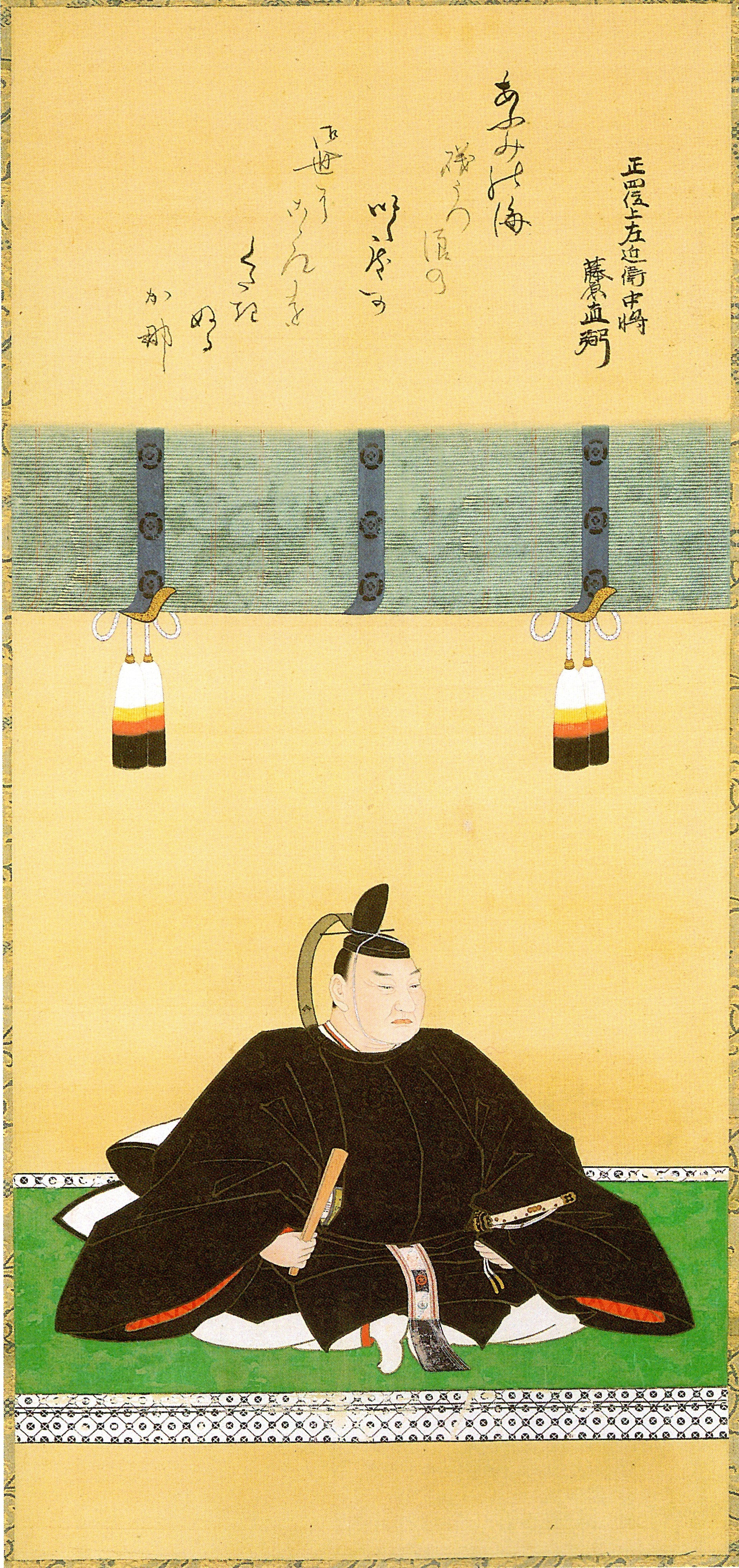 井伊直弼。Ii Naosuke.上部に直弼自筆と言われる和歌が書きこまれている。